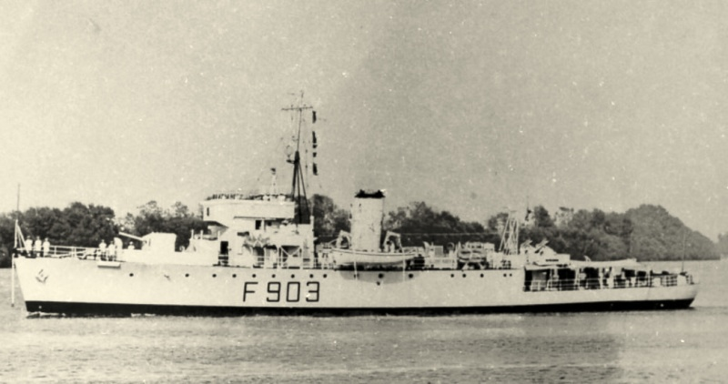 Le F903 Dufour (II) (ex-HMSC Winnipeg J337) : dragueur de mines belge de classe Algerine